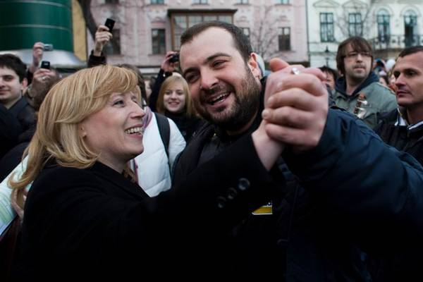 Hráme za Ivetu, 18. marec 2009, Hviezdoslavovo námestie v Bratislave